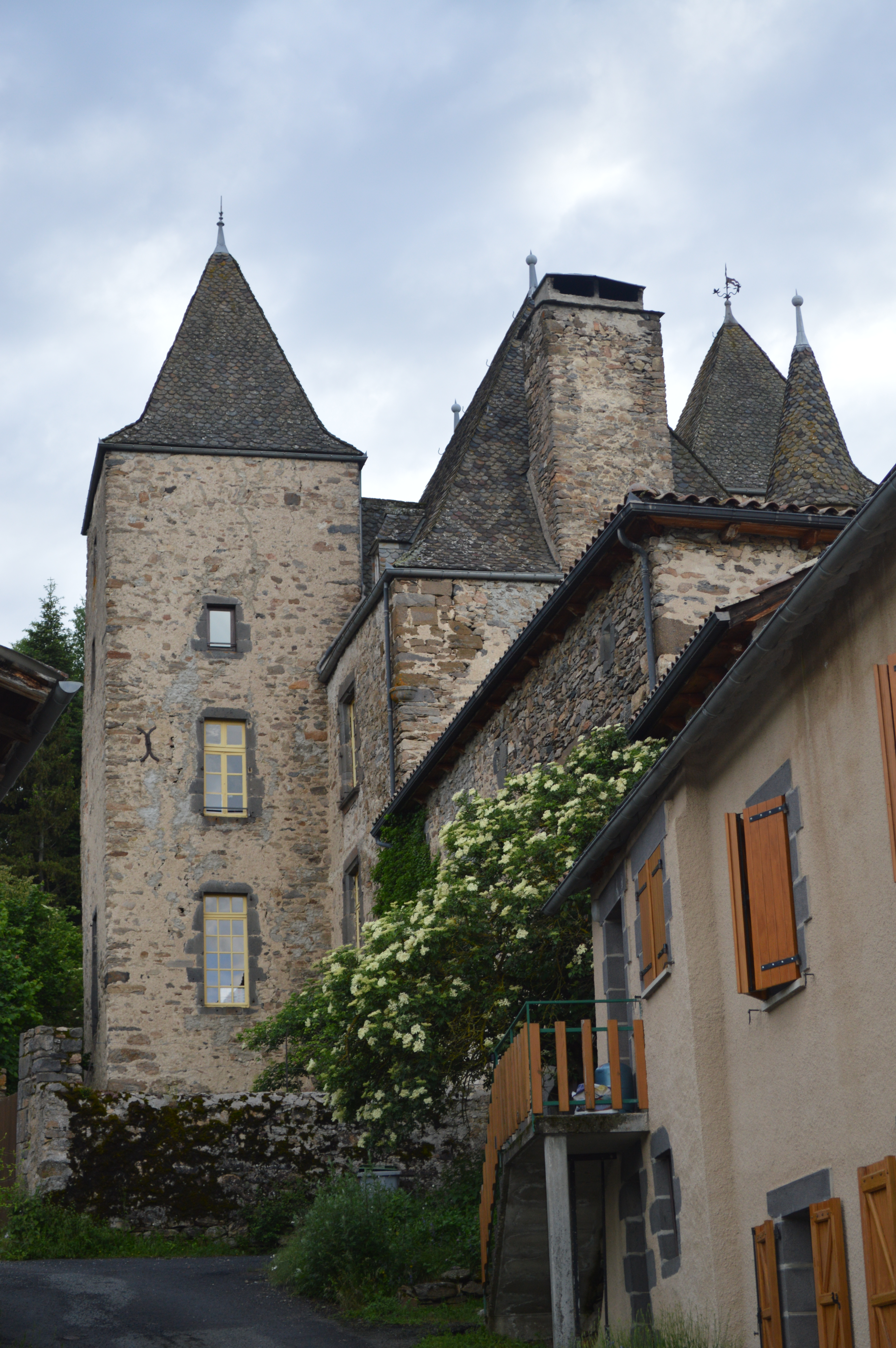 Chateau de Varillettes depuis la rue